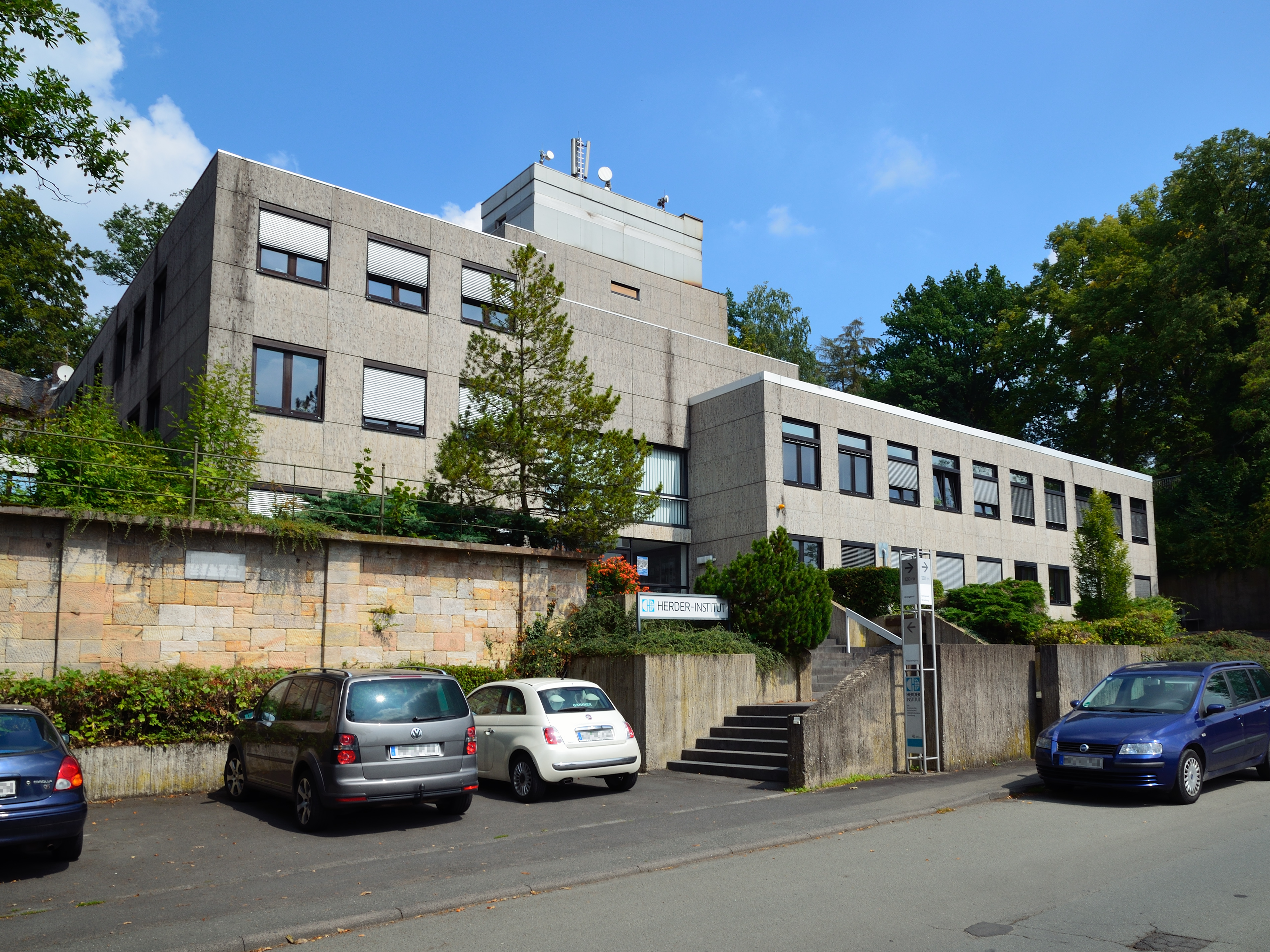 Herder-Institut Marburg, Hauptgebäude